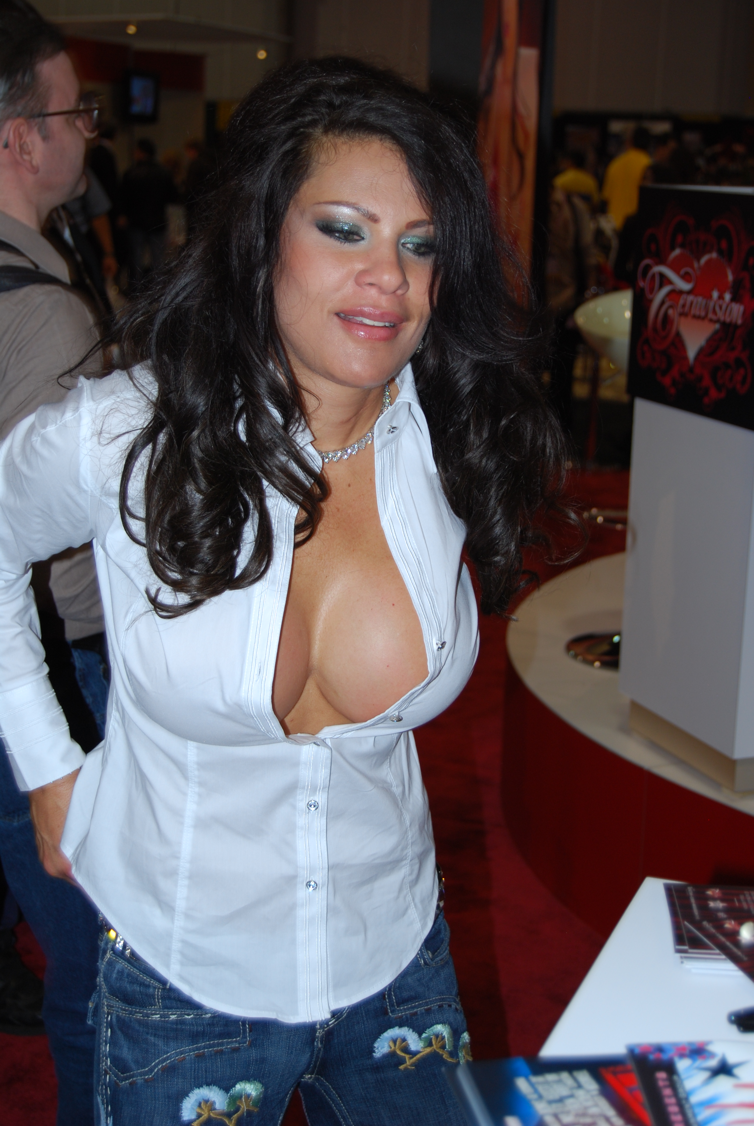 AEE2008_Nikon_Day1 152